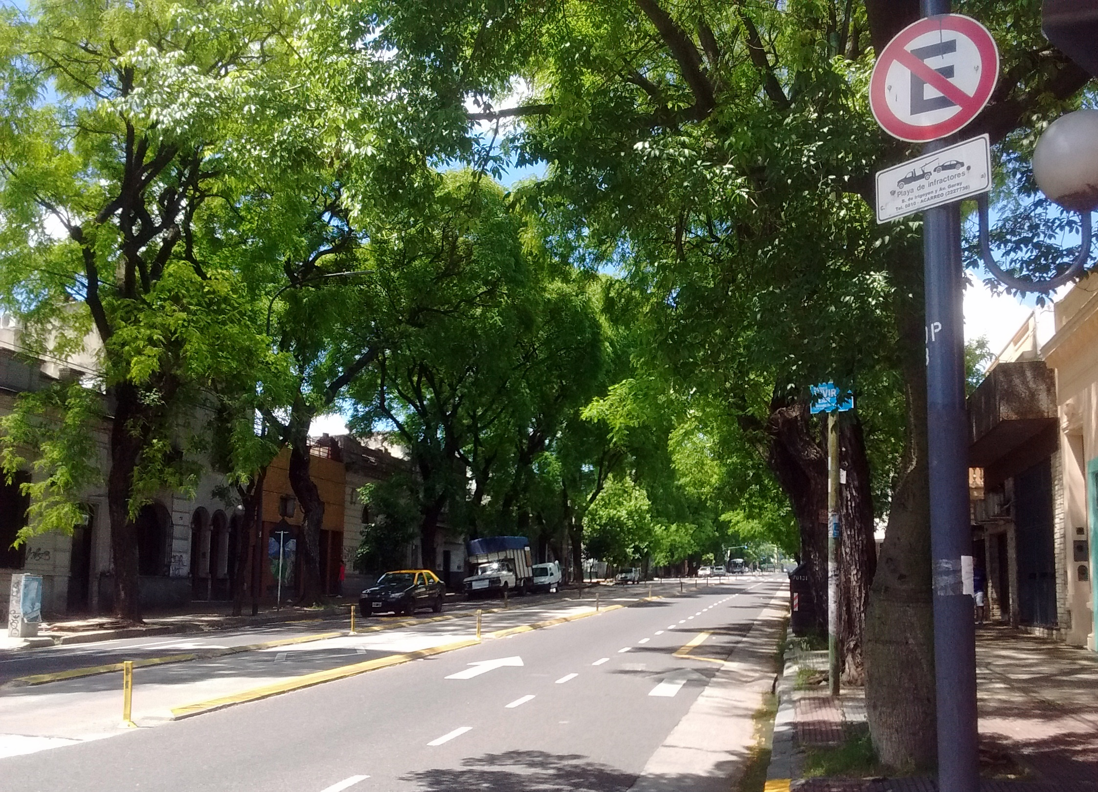 Avenida Brasil entre Dean Funes y Esquel (2800-2900), Buenos Aires, Argentina.